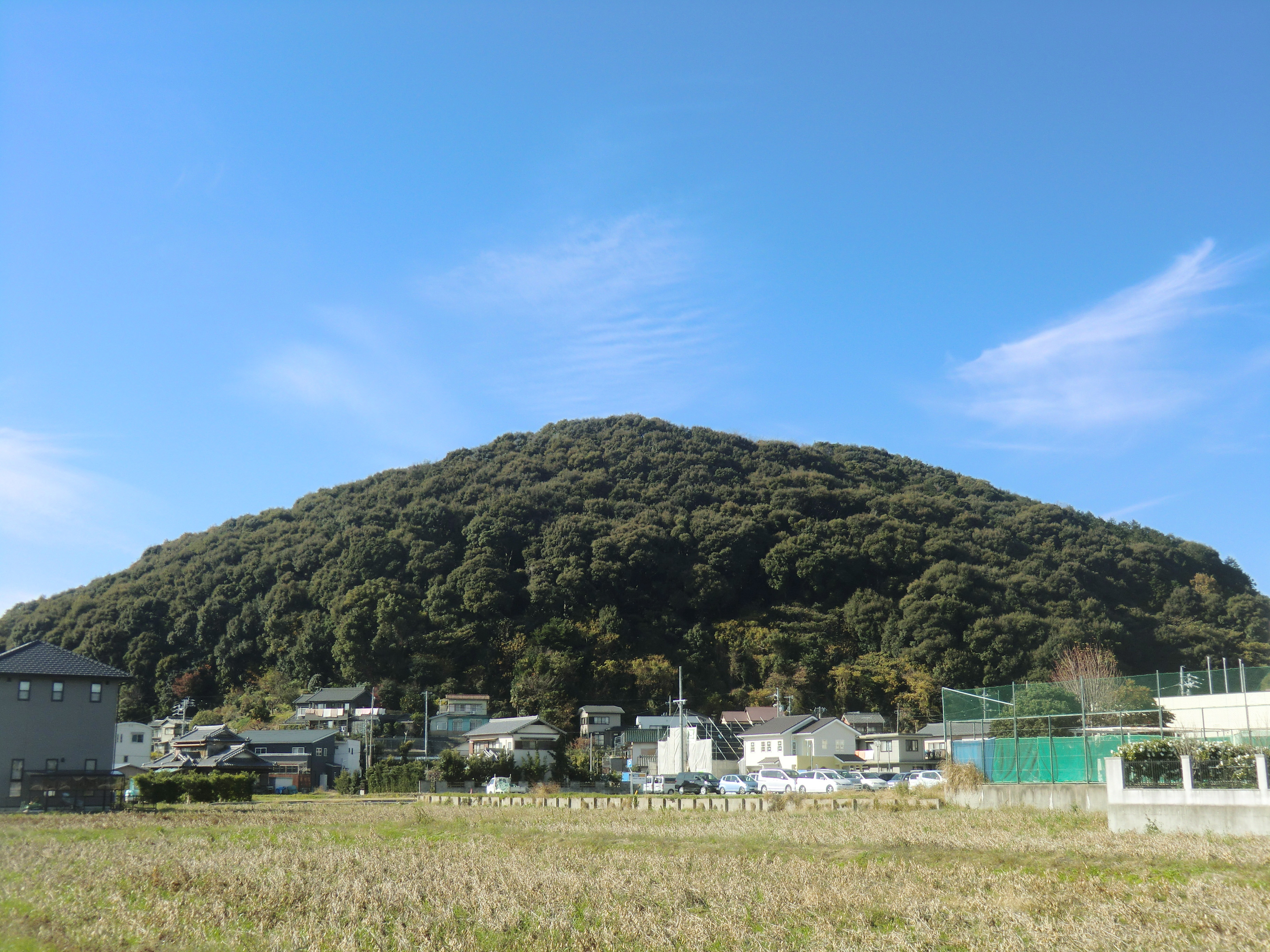 御津山。愛知県豊川市